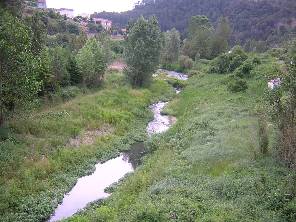 Torrent o riera de l'Om, en el seu tram final (Monistrol de Calders, Moianès)